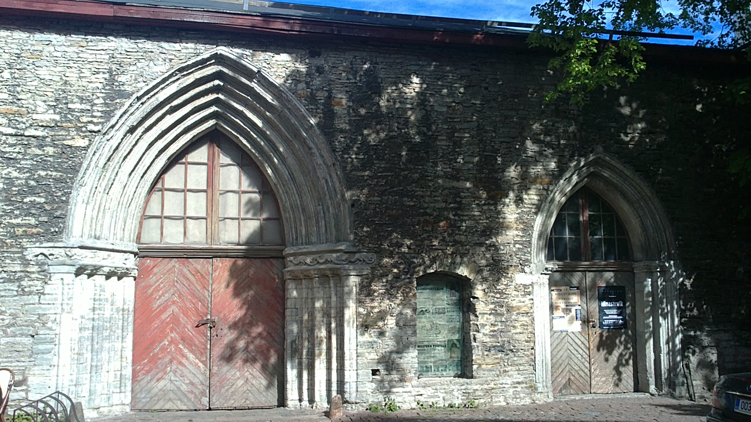 15. sajandist pärit Püha Katariina kloostri Püha Katariina kiriku säilinud lääneportaalid Tallinna vanalinnas Vene tänava sisehoovis